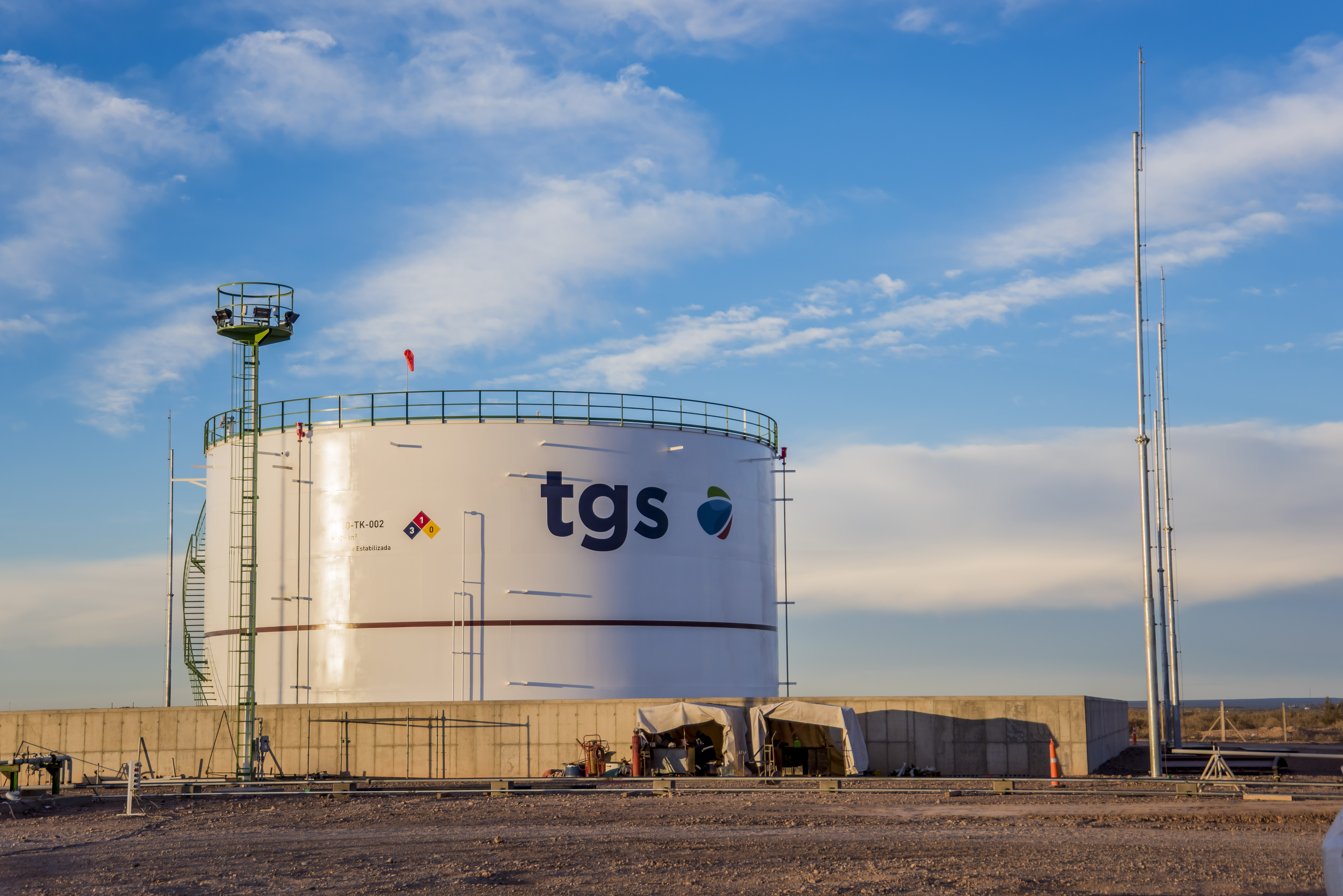 Imagen de la planta de TGS